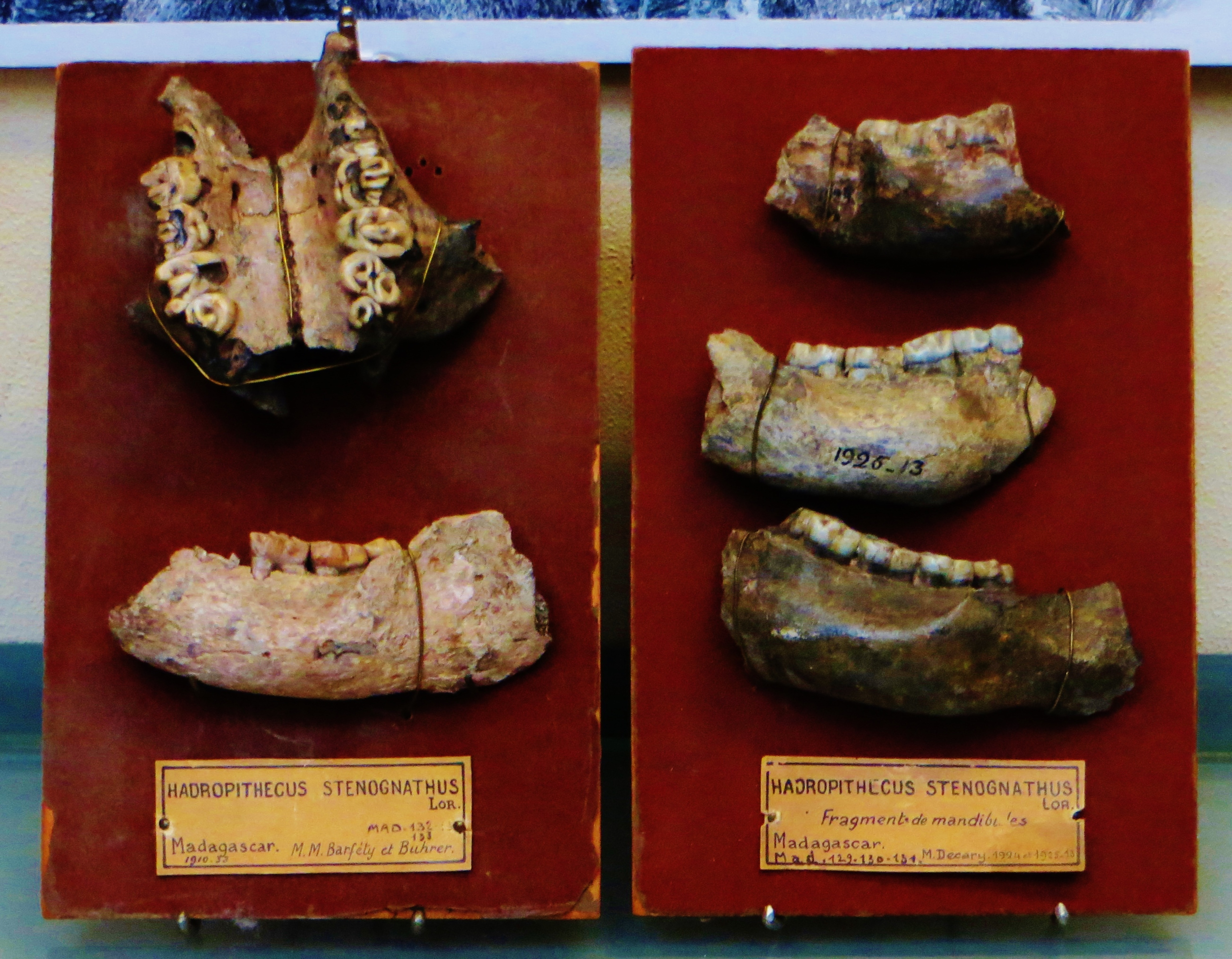 Fossil of Hadropithecus, an extinct mammal- Took the photo at Musee d'Histoire Naturelle, Paris